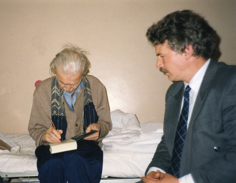 Н. И. Дорошенко в больнице у Леонида Леонова. 1993 г.